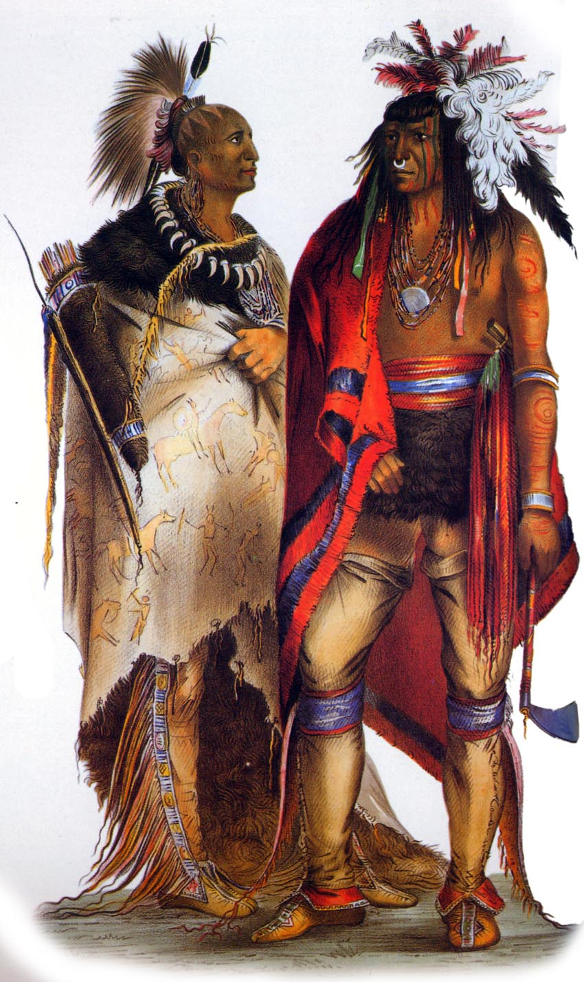 Два ірокези